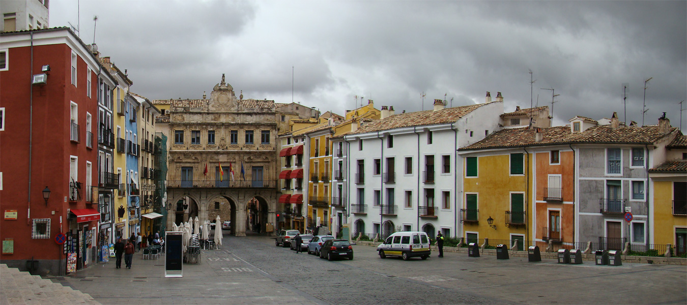 Plaza Mayor, Cuenca, Castilla-La Mancha, España.